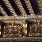 Dogenporträts im Palazzo Barbarigo della Terrazza